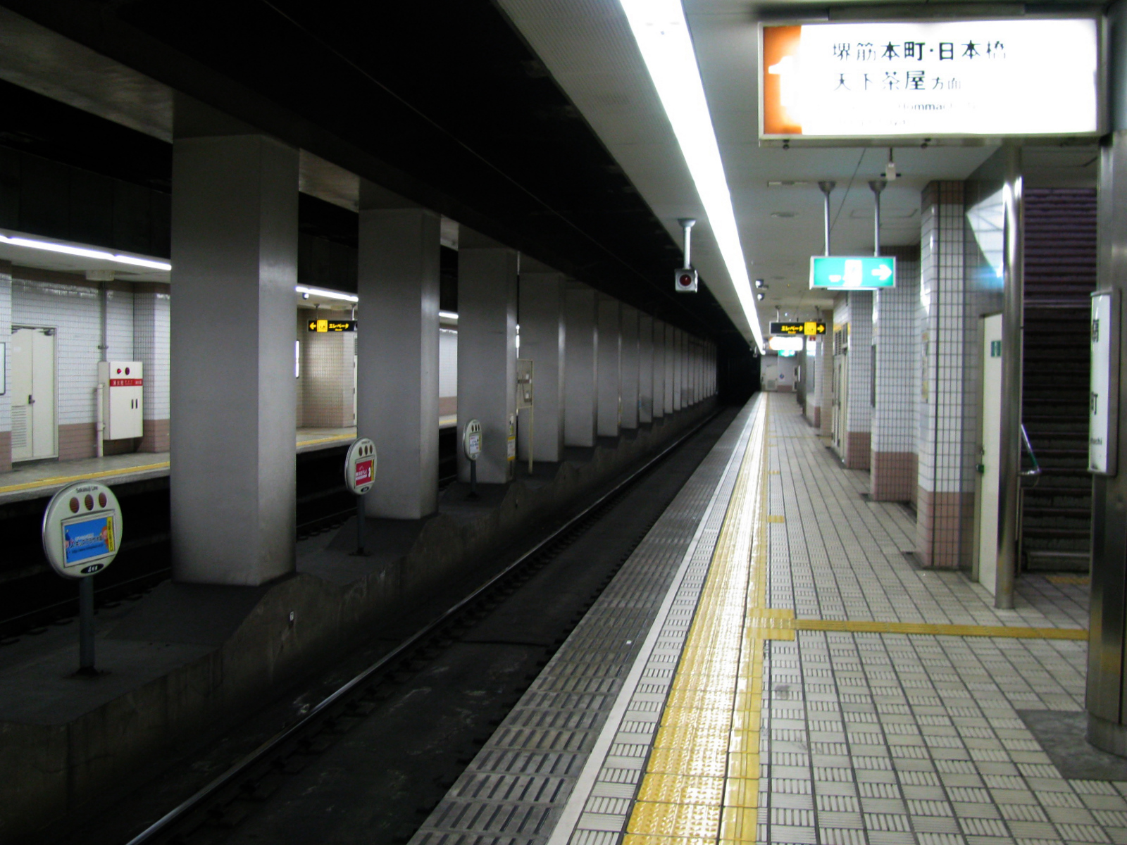 大阪市営地下鉄扇町駅